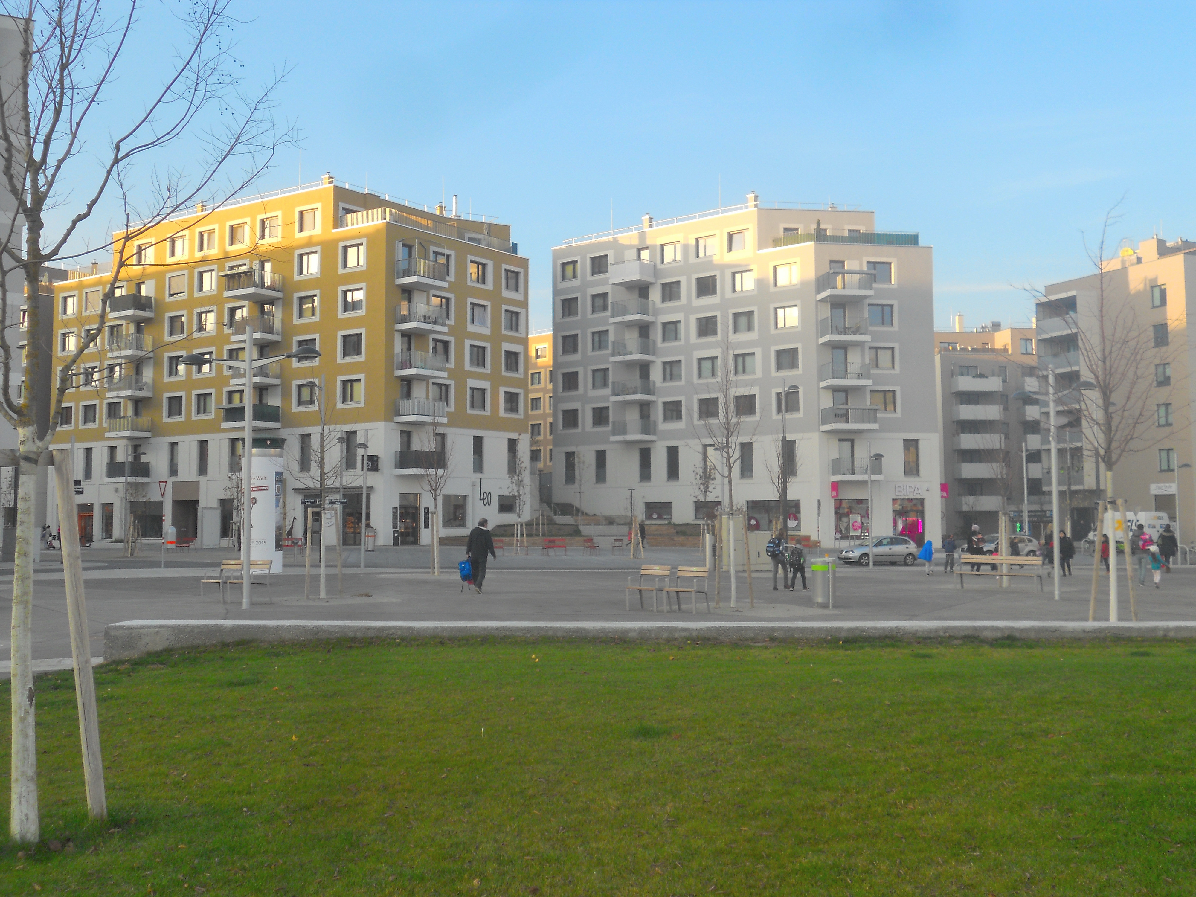 Der Hannah-Arendt-Platz in der Seestadt Aspern, die Rasenfläche im Vordergrund ist Teil des Hannah-Arendt-Parks